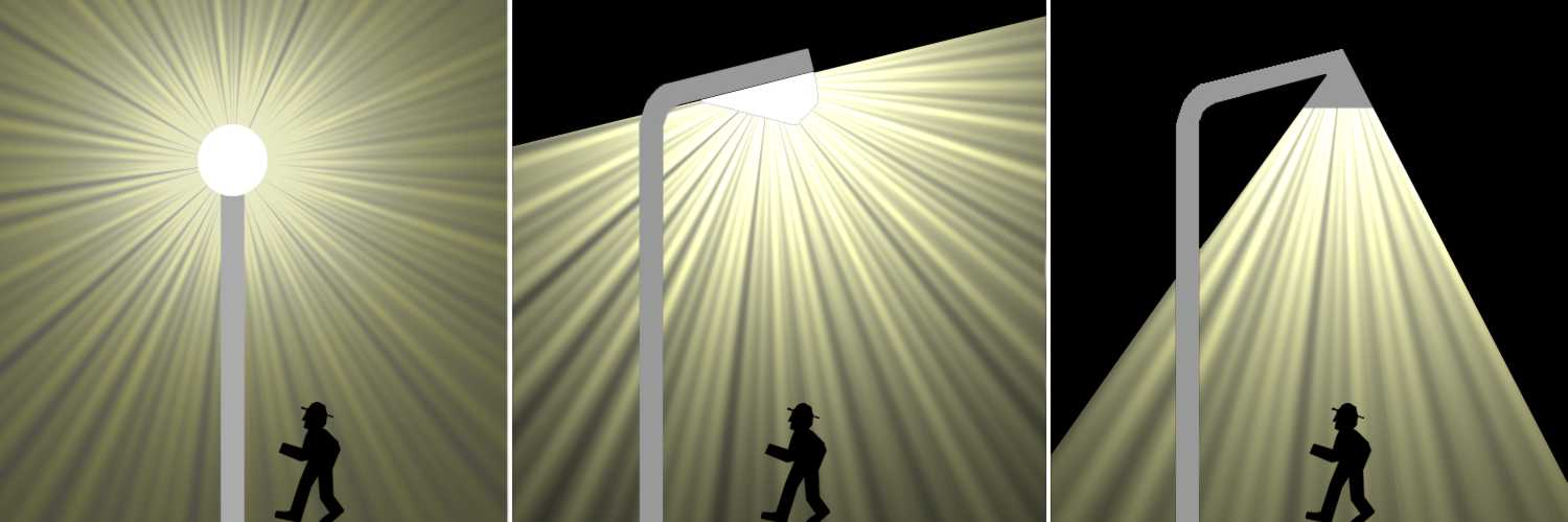 Lichtradien verschiedener Straßenbeleuchtungen